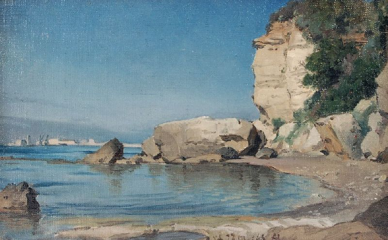 wahrscheinlich im Golf von Neapel (Castellammare von Pozzano aus?)